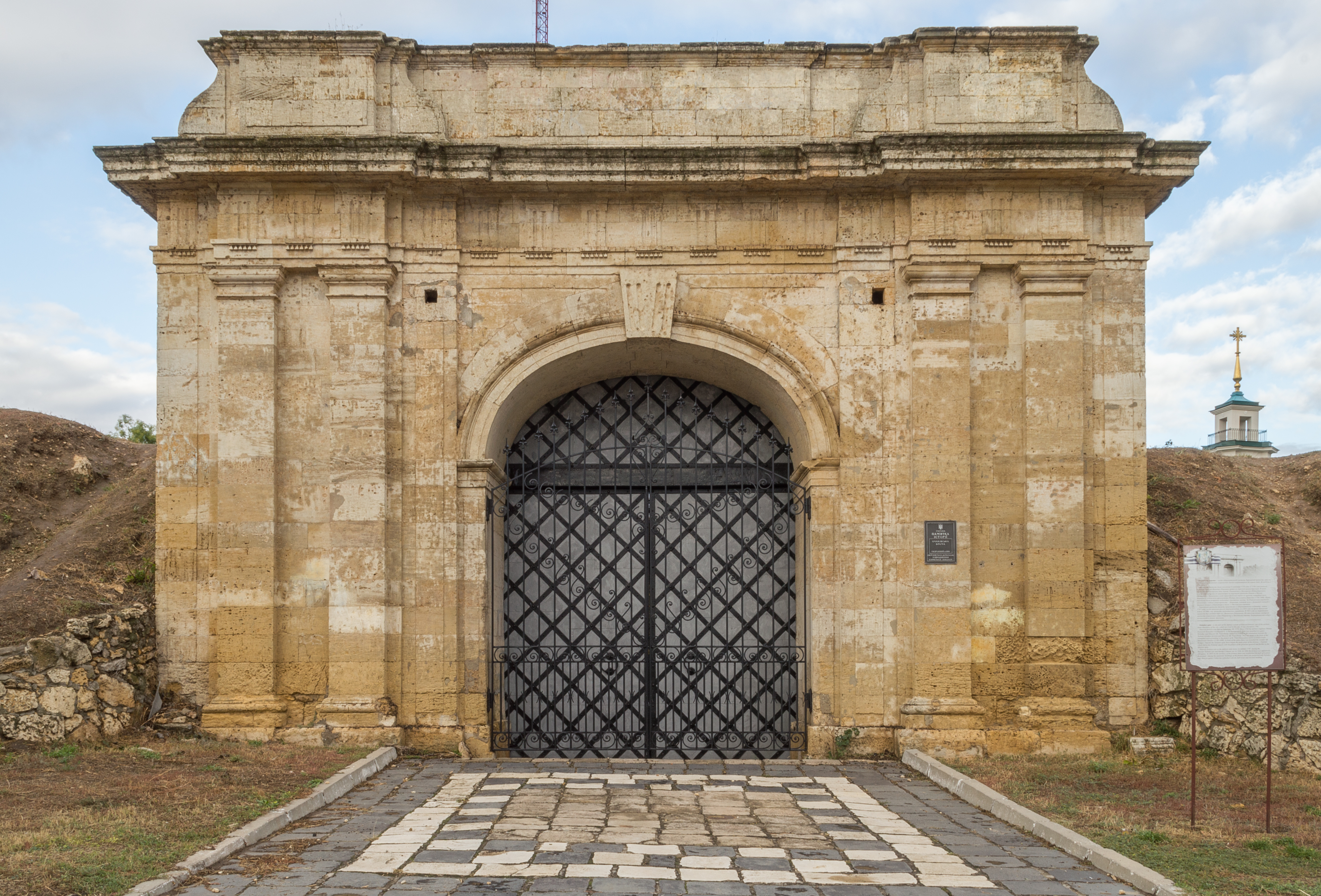 Очаківська південна брама фортеці (мур.), Херсон, Перекопська вул., 13 (Комсомольський парк)